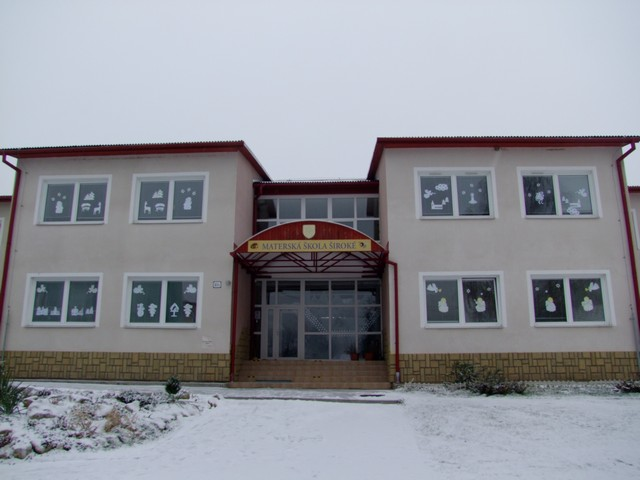 Materská škola Široké